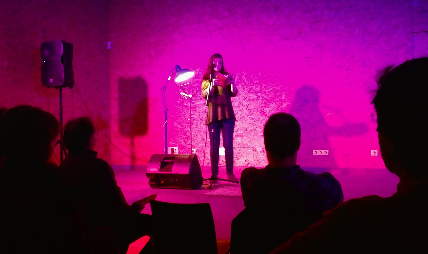 Lectura de poemas por parte del Aula de Poesía de Barcelona en el Palau Alós, en el marco del "IV MUTIS".